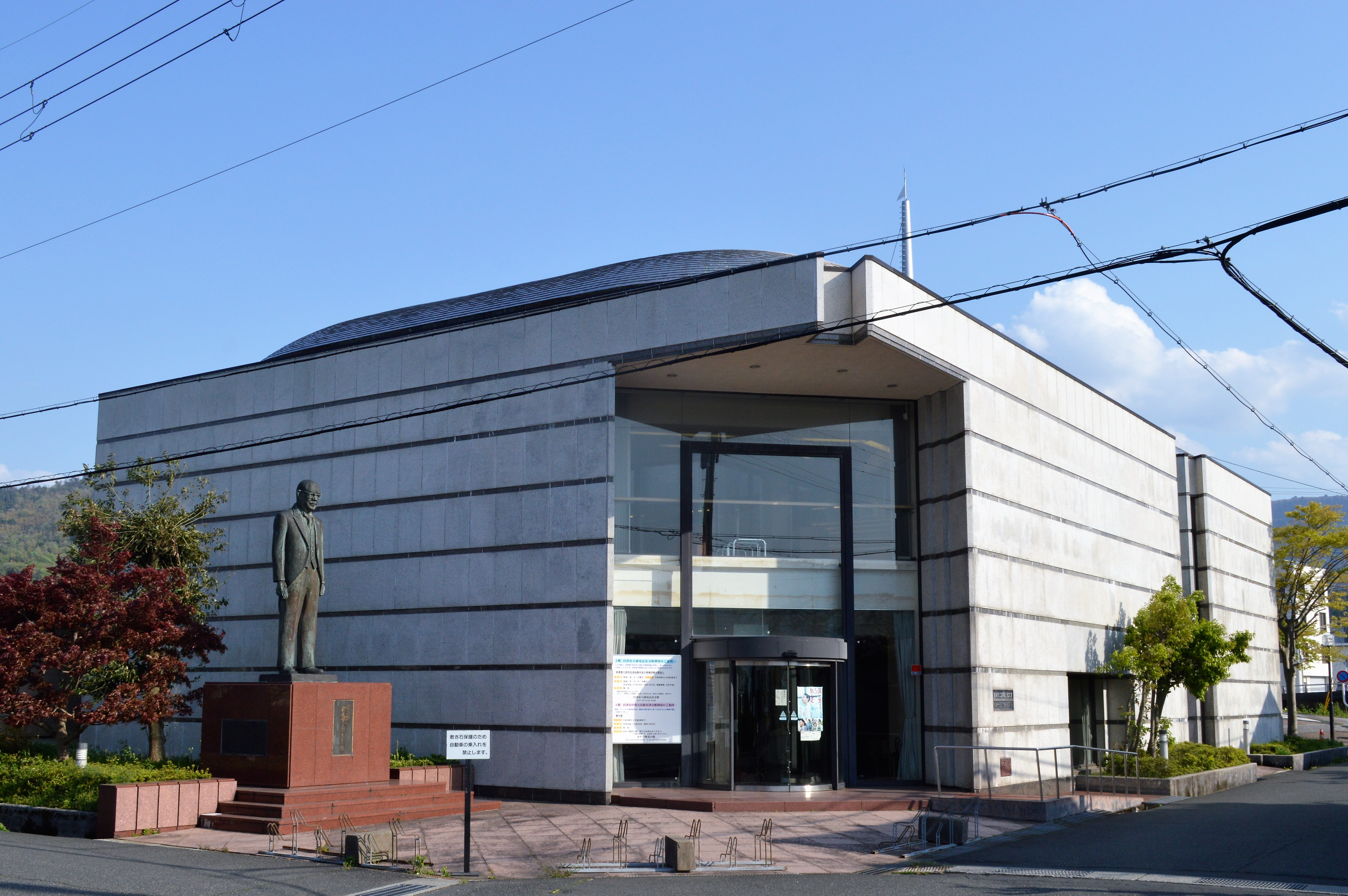 京都府宮津市にある宮津市立前尾記念文庫。宮津市出身の政治家・前尾繁三郎から蔵書の寄贈を受けて開館した。